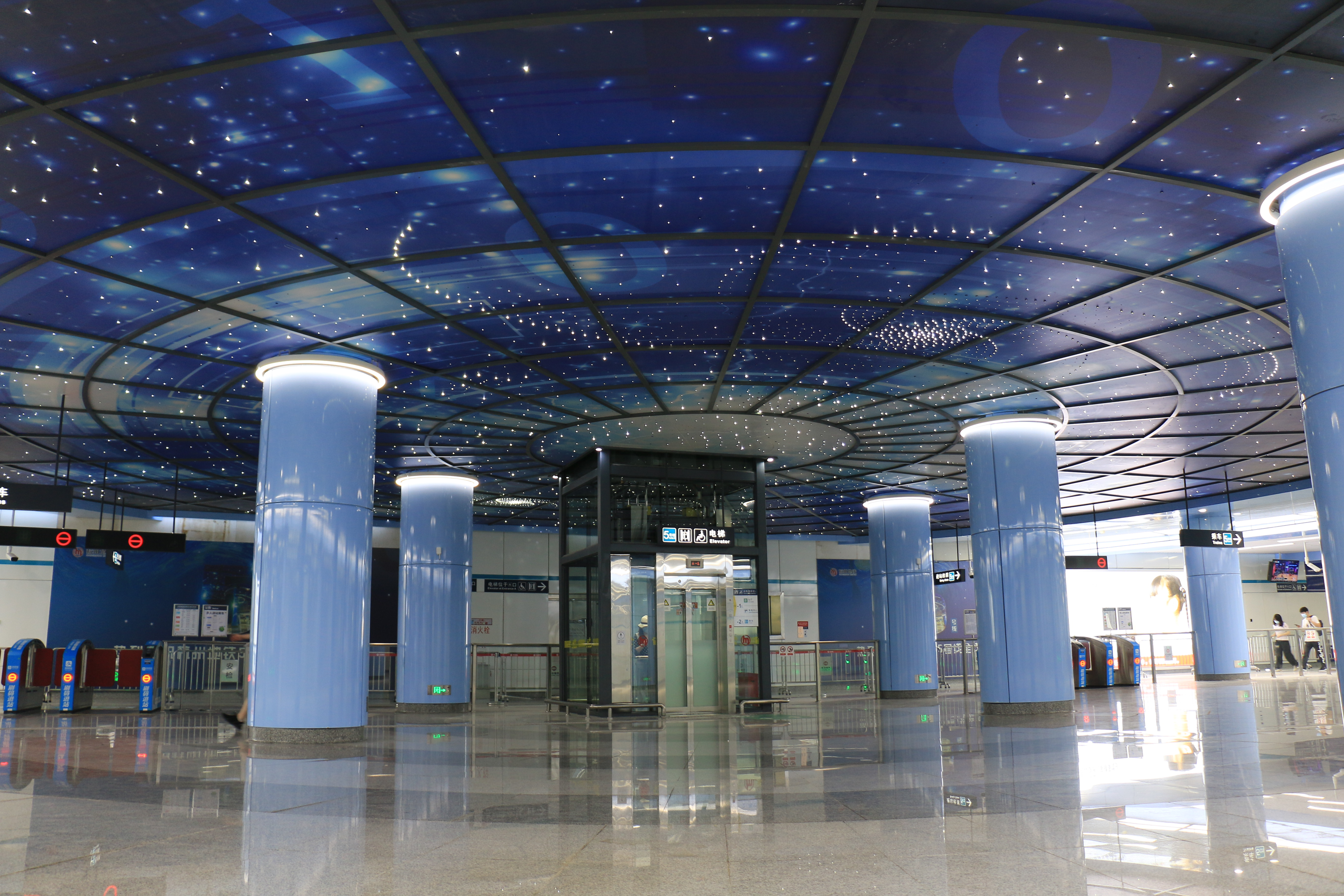 创景路站星空顶棚